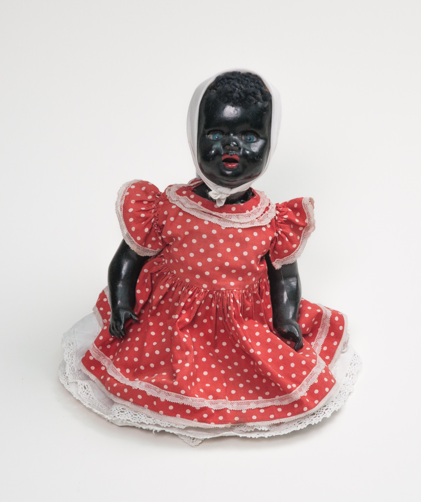 Regalo de la Fundación Eva Perón entregado a los niños para navidad.